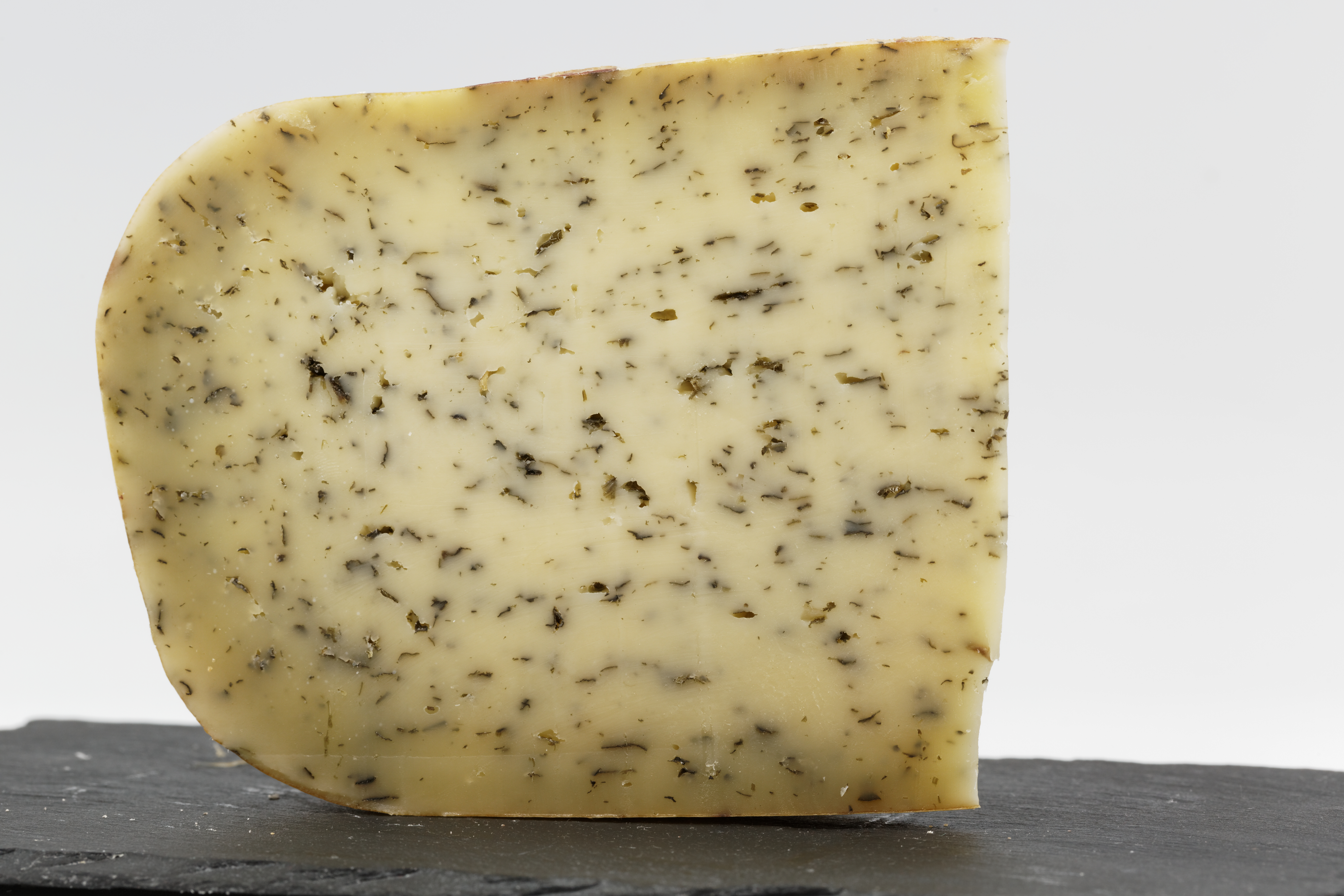 Le Gouda aux orties, fromage des Pays-Bas.